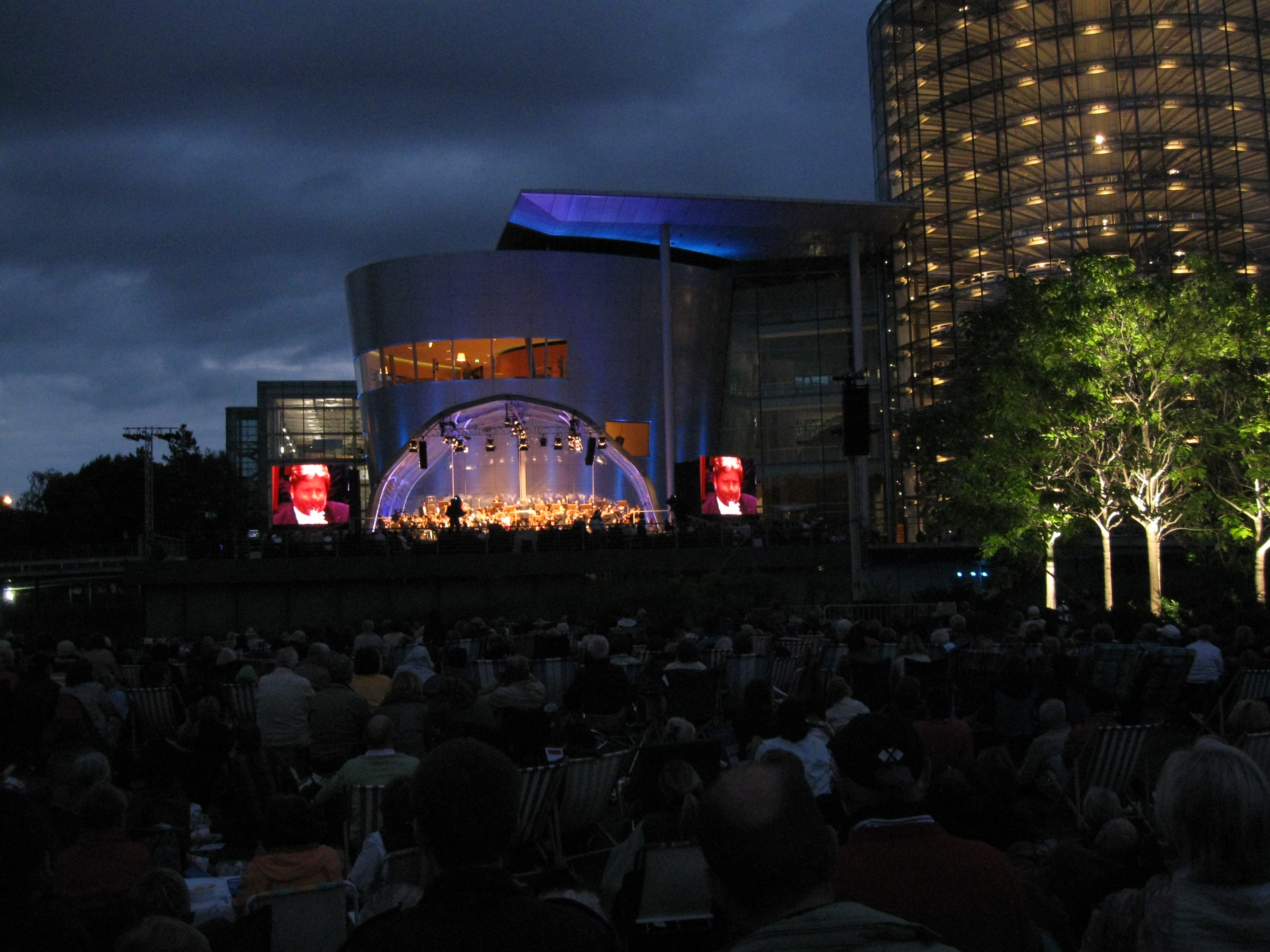 Auf dem Freigelände hinter der Manufaktur finden regelmäßig Open-air-Konzerte statt.